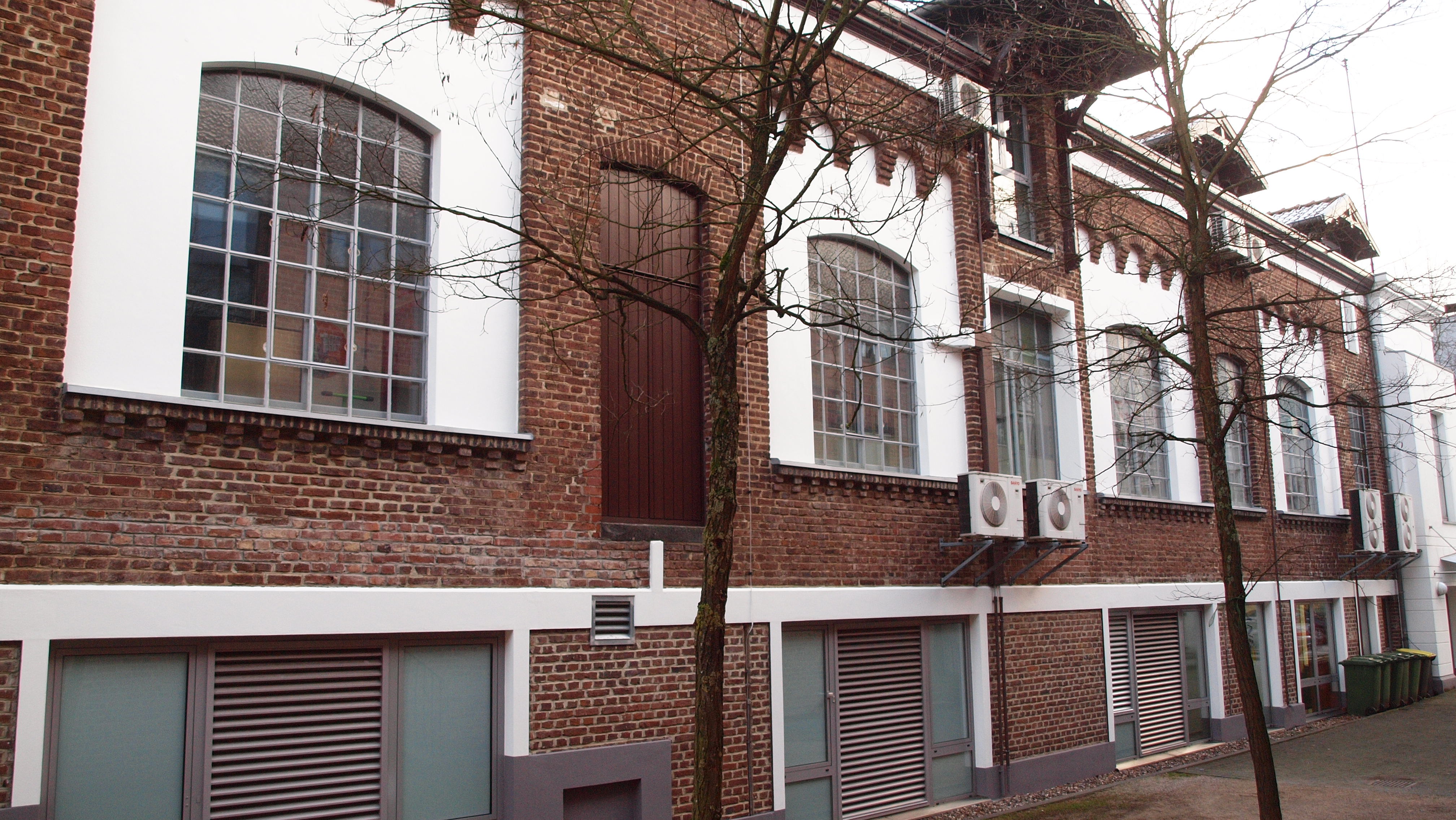 Fabrikkomplex „Chronos-Werk“, Frankfurter Straße 89, Hennef (Sieg)